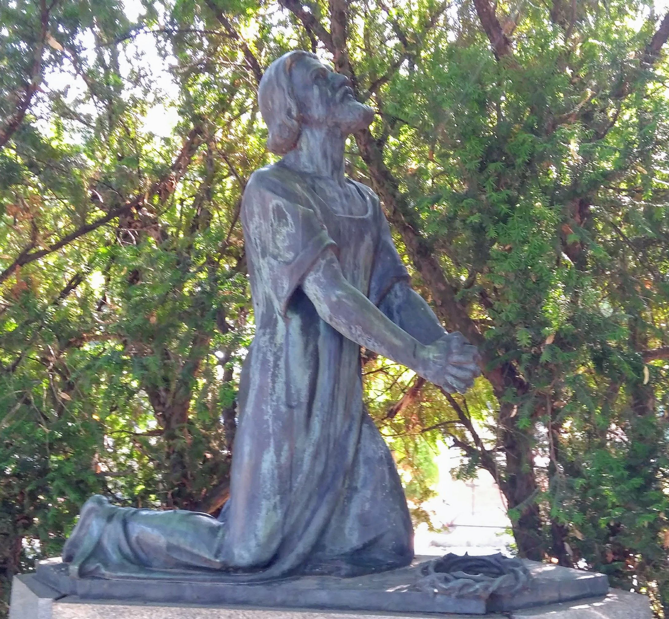 Klečící Ježíš Kristus, hřbitov Kroměříž, 1926, Karel Korschann (1872-1943), 150 x 135 cm